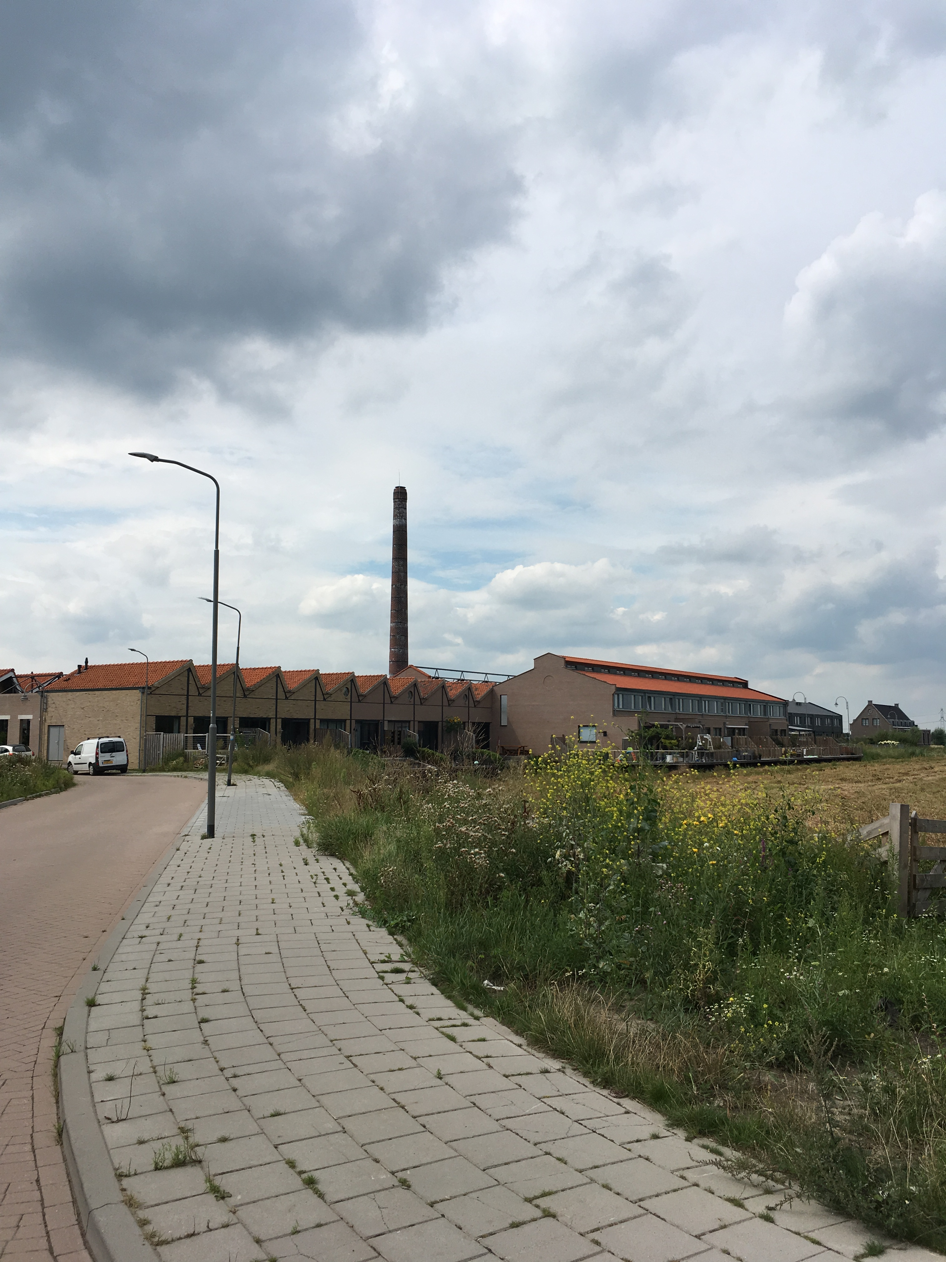 Woonwijk in historische panden Touwfabriek G. van der Lee, onder meer in ketelhuis (met schoorsteen)